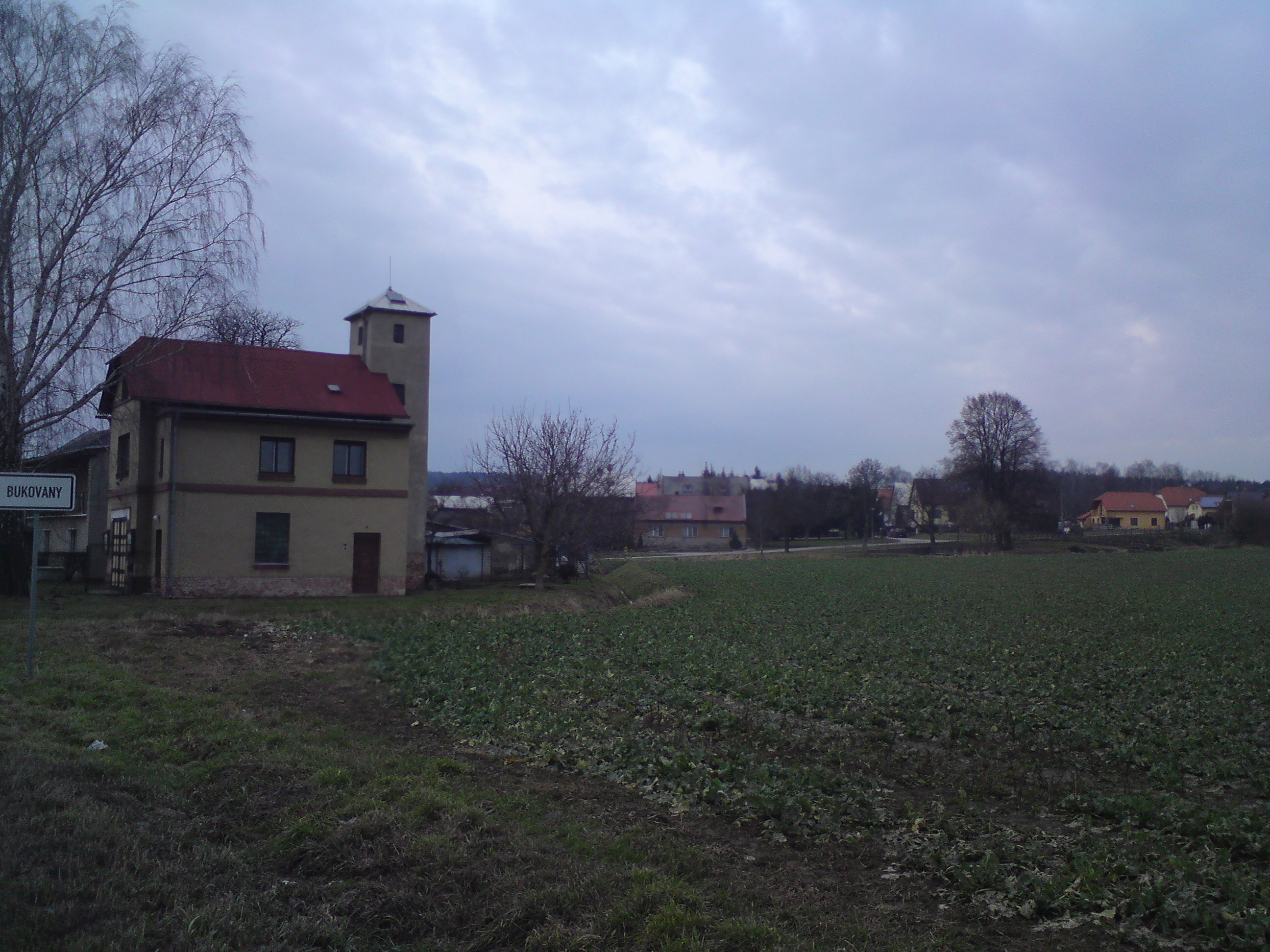 Bukovany v okrese Olomouc (pohled od sinice z Velké Bystřice)